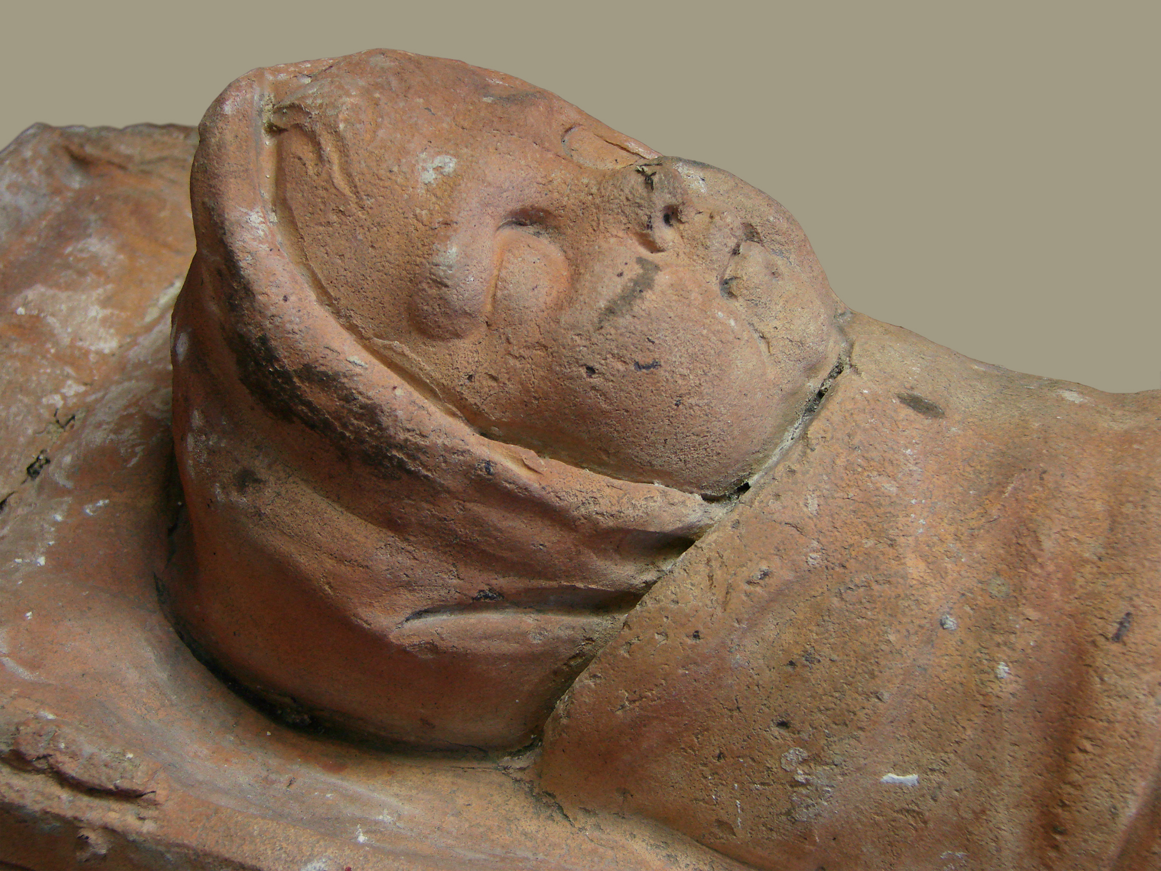 Ex-voto gallo-romain en terre cuite représentant un bébé emmailloté ; provient de Bavay (département du Nord; Bagacum dans l'Antiquité.). Musée Saint-Remi à Reims.